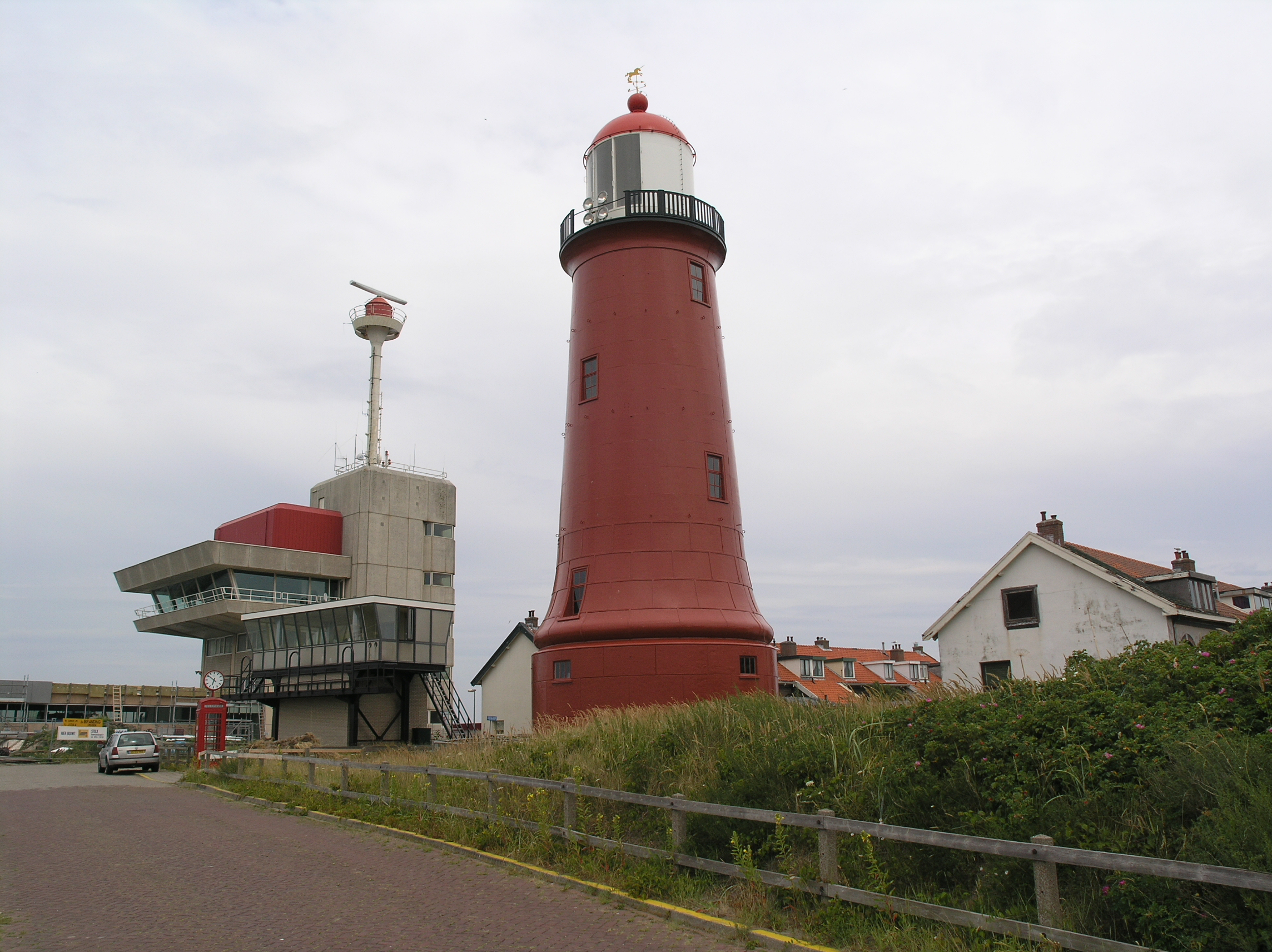 Kleine vuurtoren van IJmuidenvuurtoren